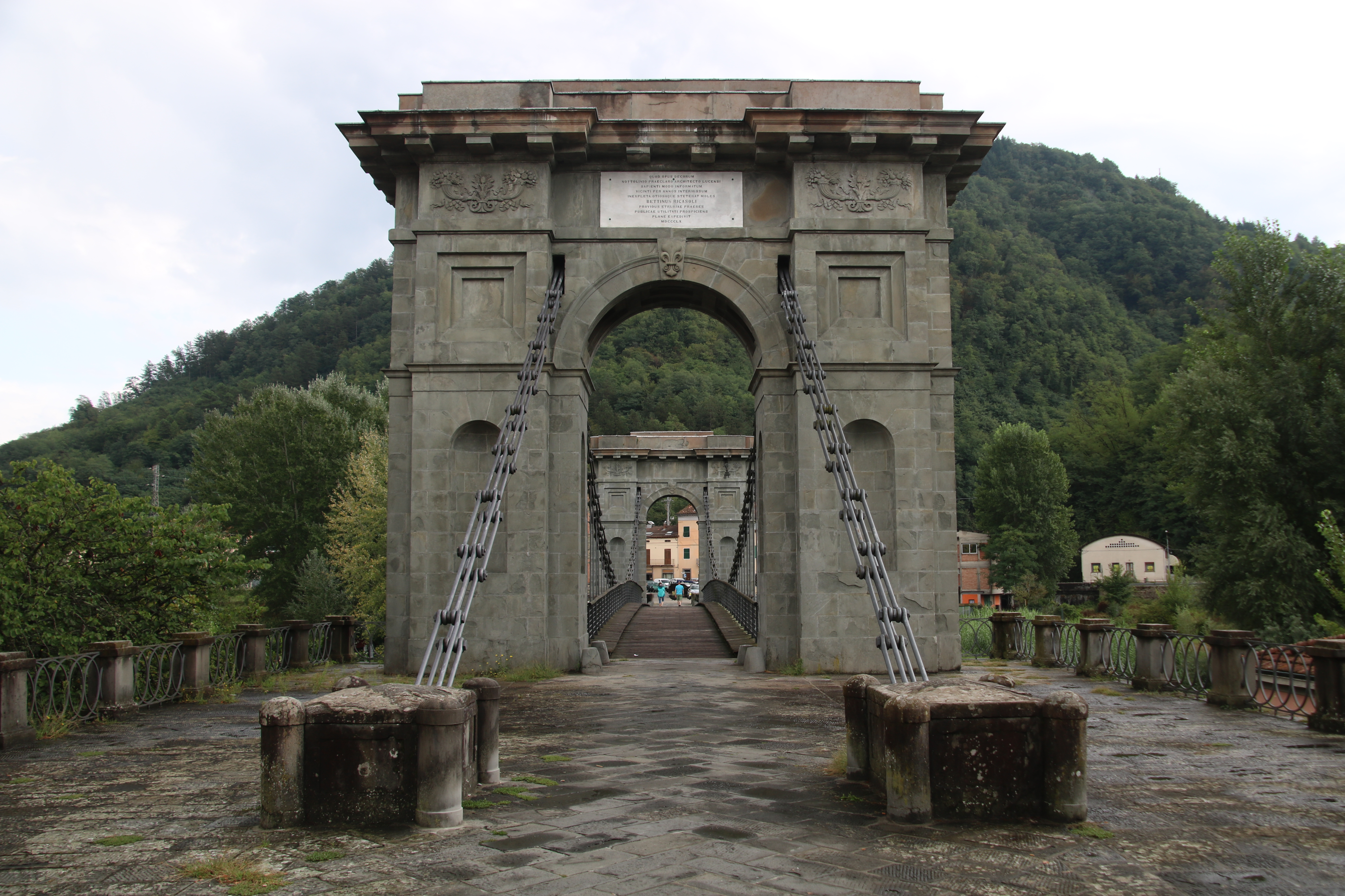 Ponte delle Catene (Fornoli) a Bagni di Lucca